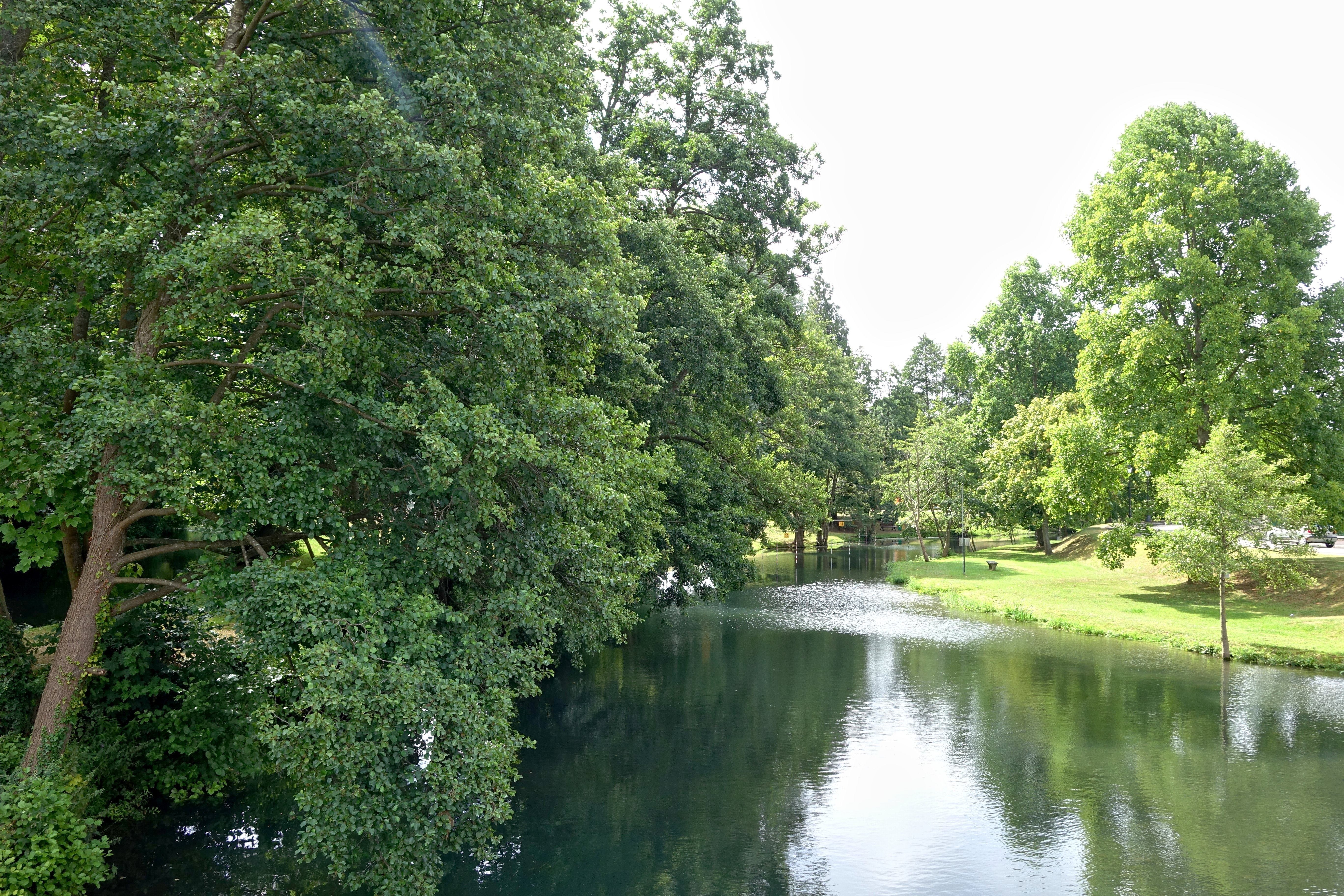 La Risle à Beaumont-le-Roger, Eure, France